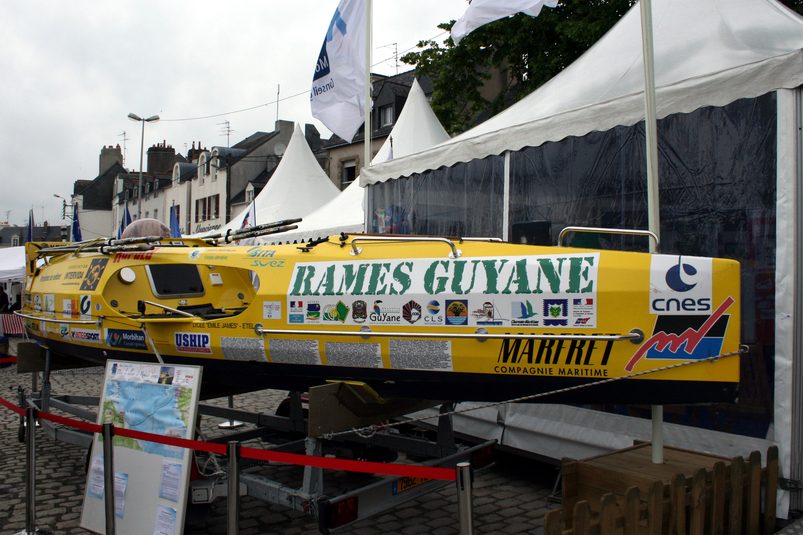 Bateau de Romain Vergé lors de Rame Guyane.